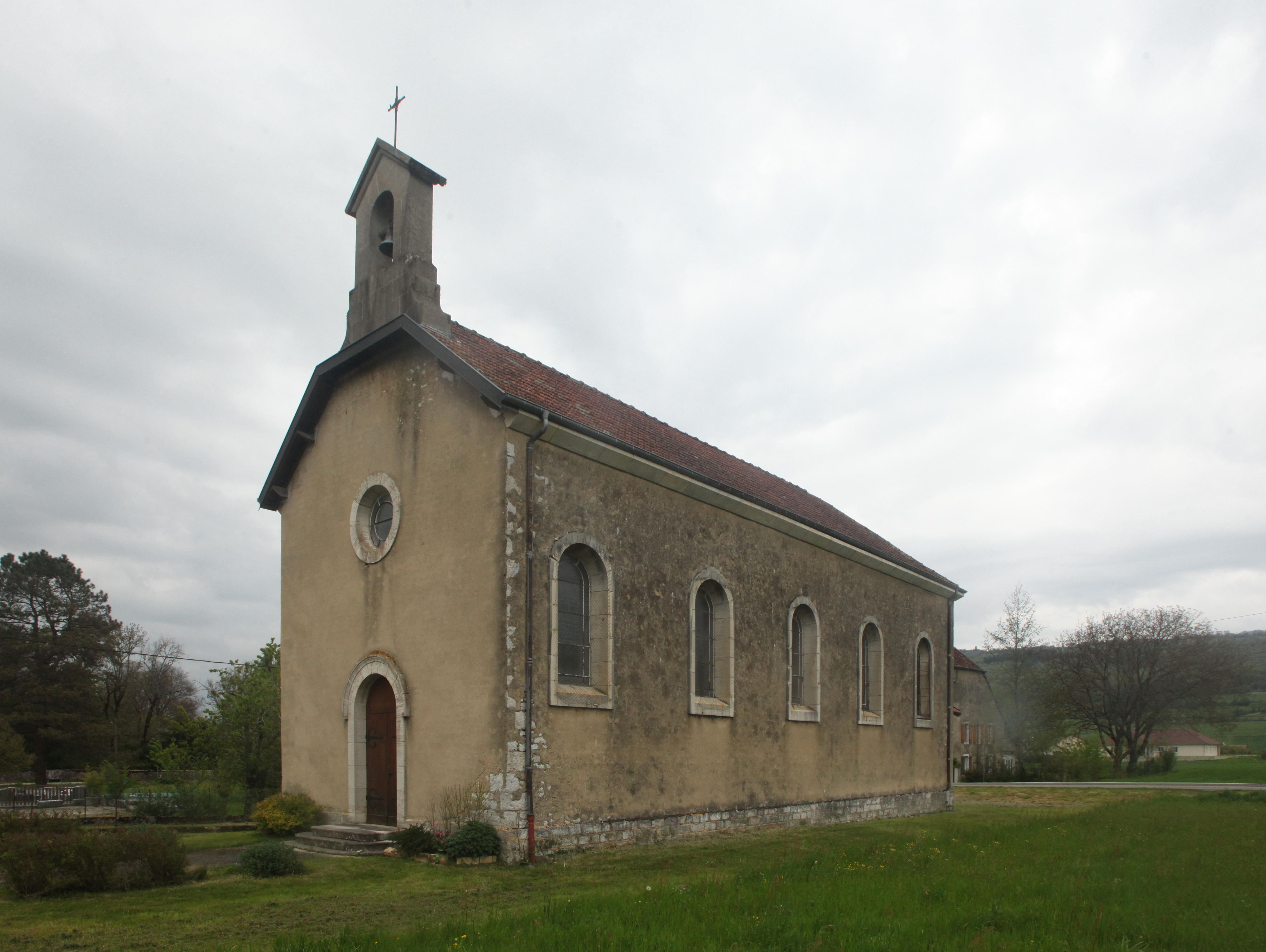 L'église de la Vierge-Marie à Rennes-sur-Loue (Doubs).